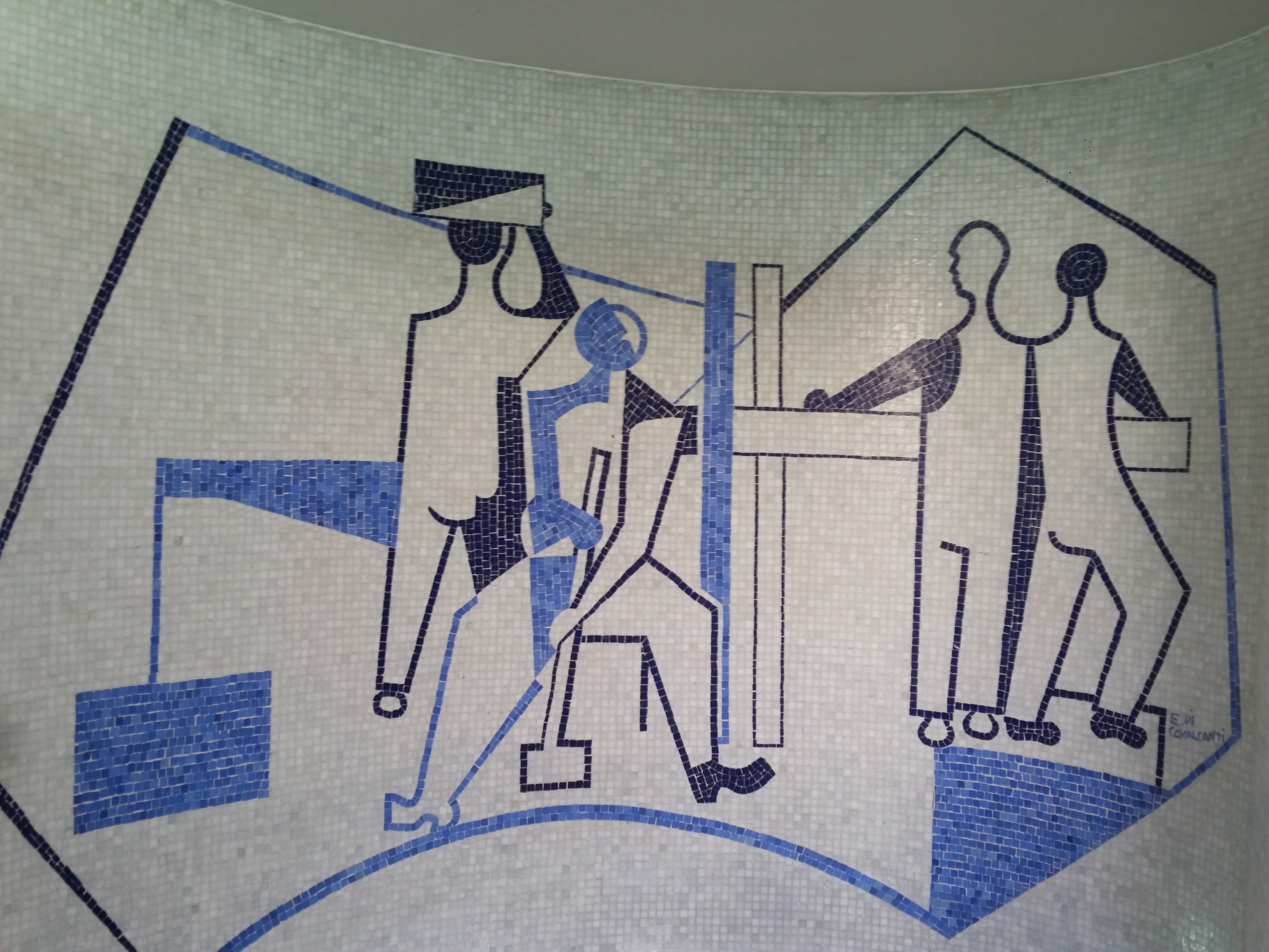 Segundo mural de Di Cavalcanti, na parte superior do Hall de entrada do Edifício Triângulo, em São Paulo (SP), Brasil